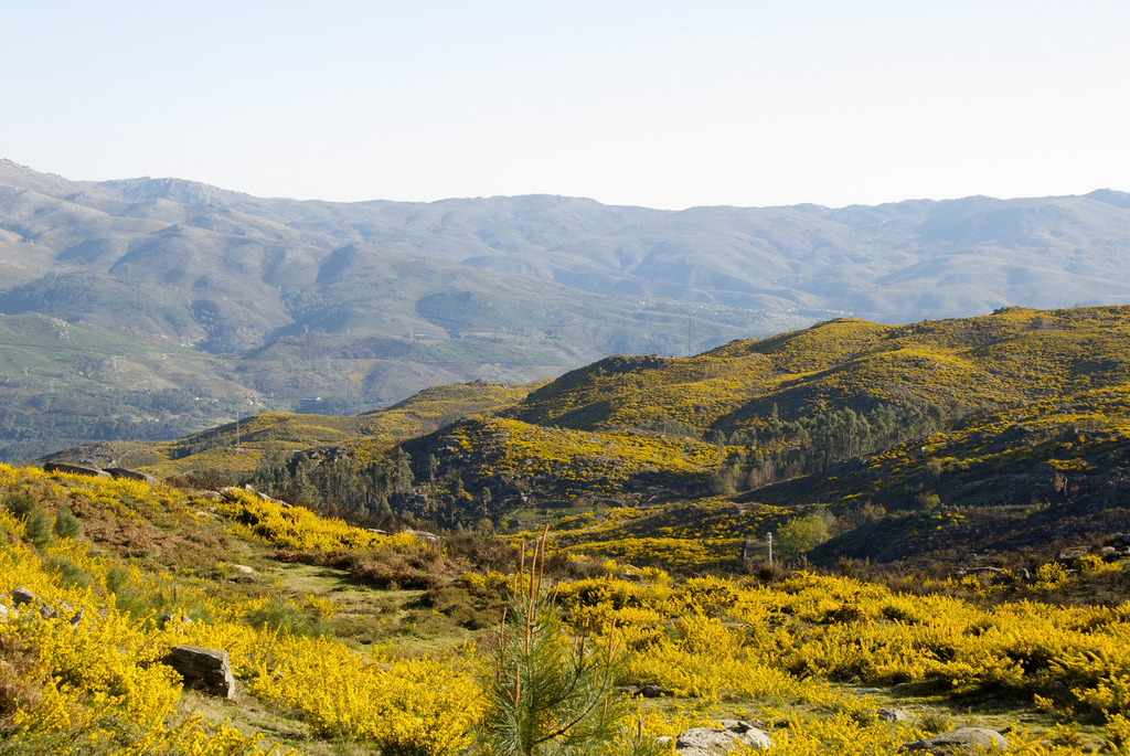 Amarelo predominante